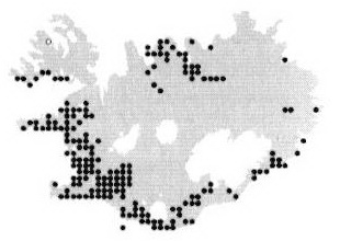 Ареал Filipendula ulmaria в Исландии